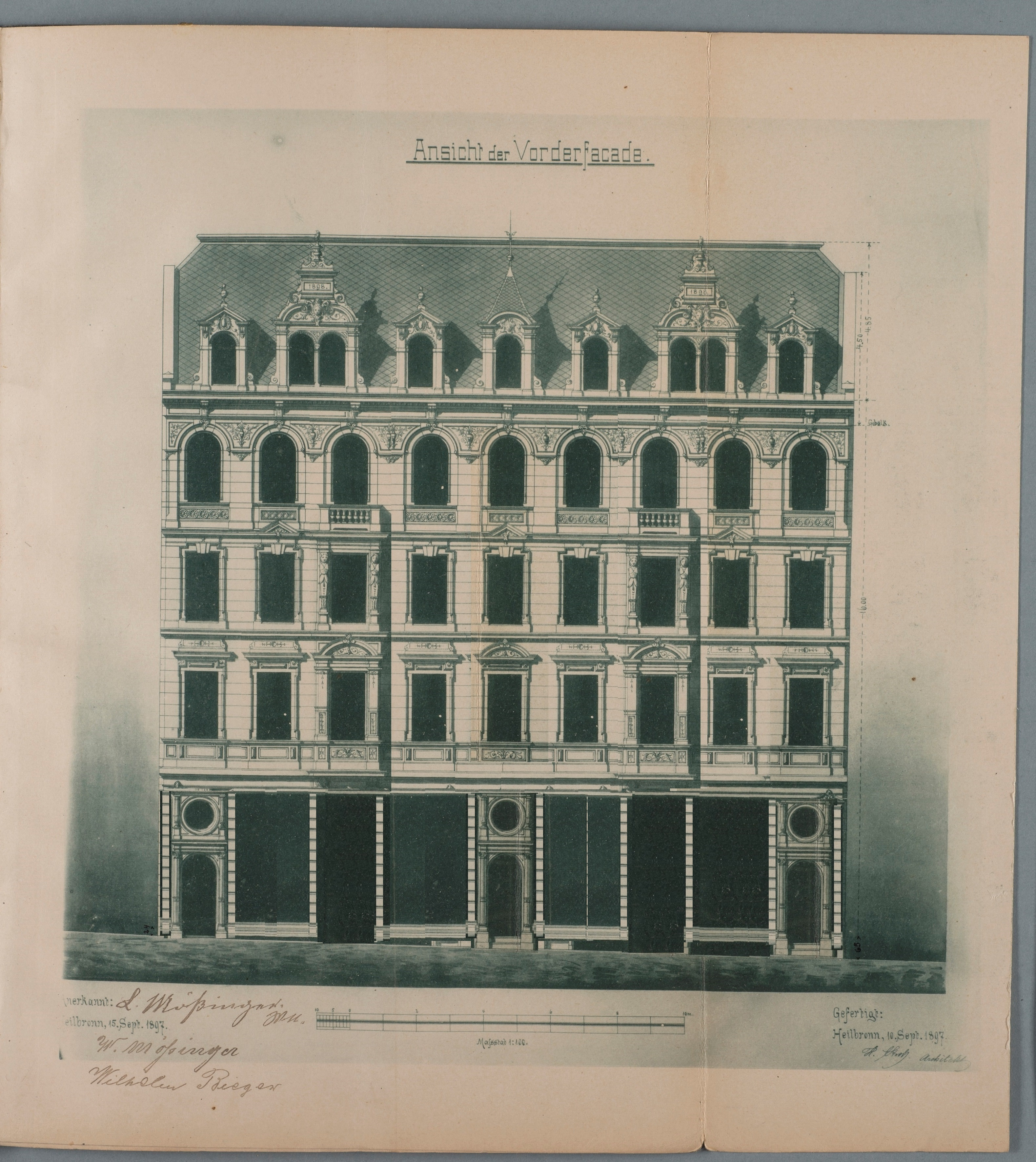 Heilbronn, Doppelhaus Kaiserstraße 42 und 44, ausgeführter Entwurf von Heinrich Stroh (* 30. Dezember 1854; † 26. Januar 1944)